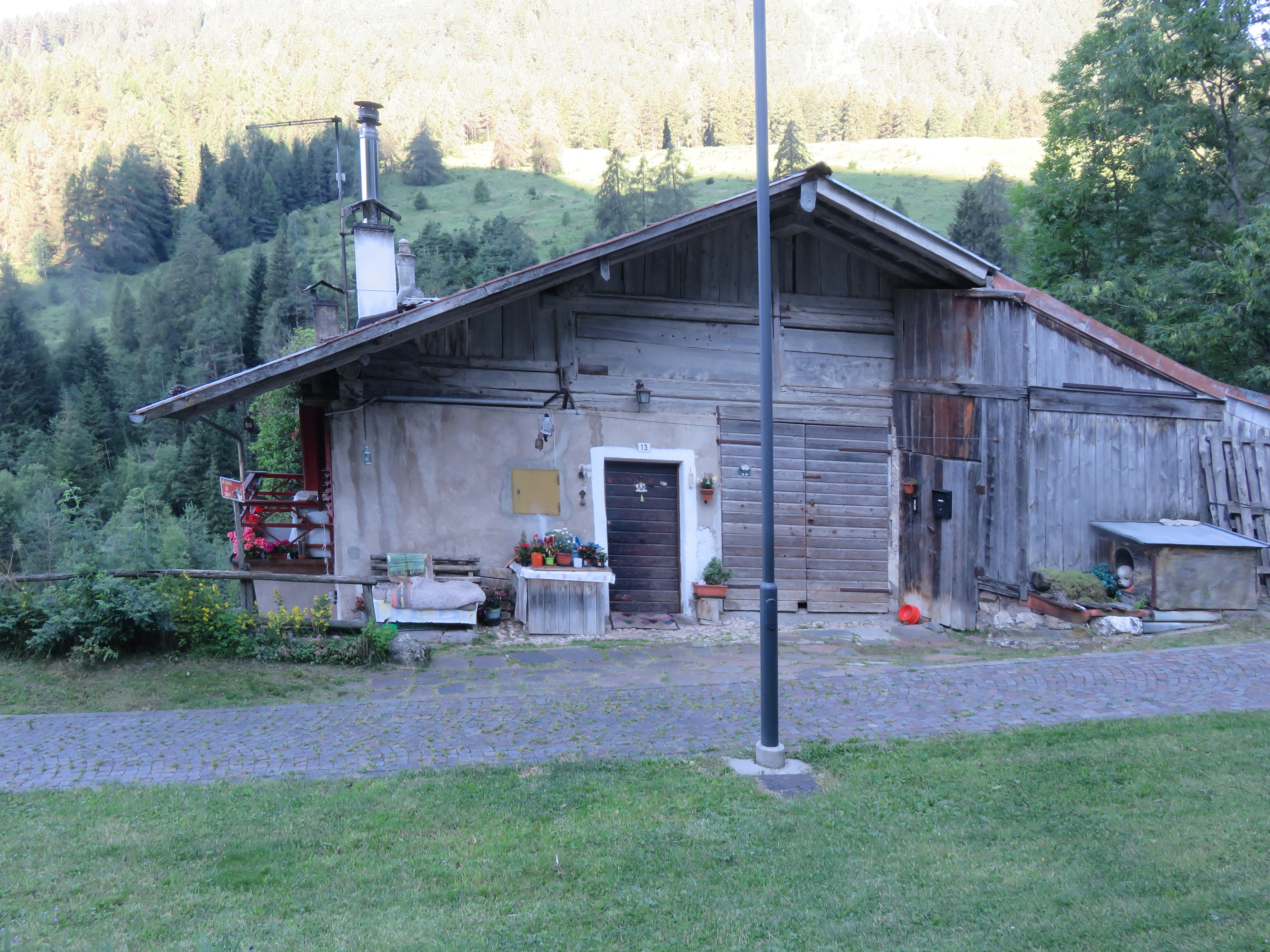 casa accanto alla Chiesa della Palanca